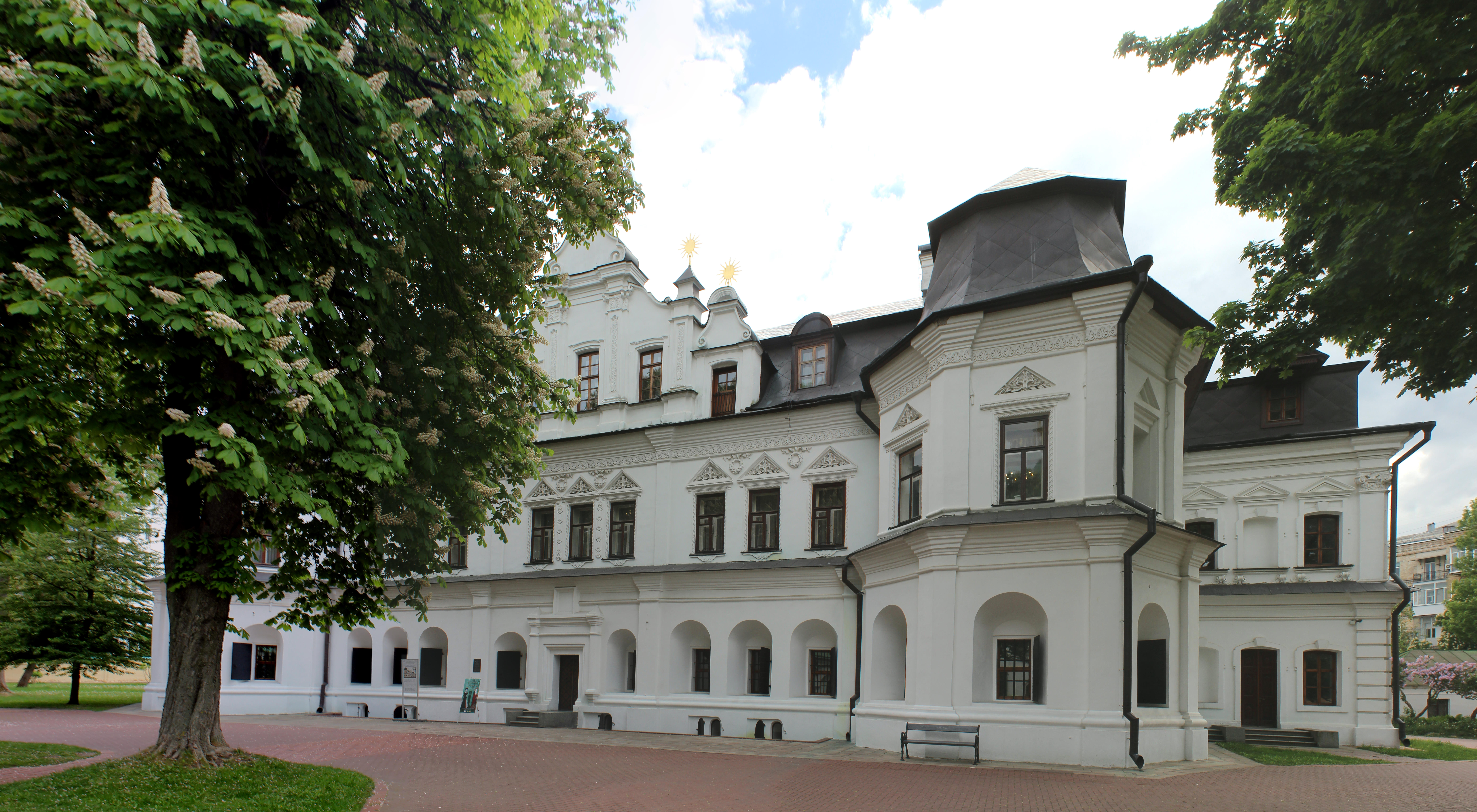 Будинок митрополита, Київ, Володимирська вул., 24